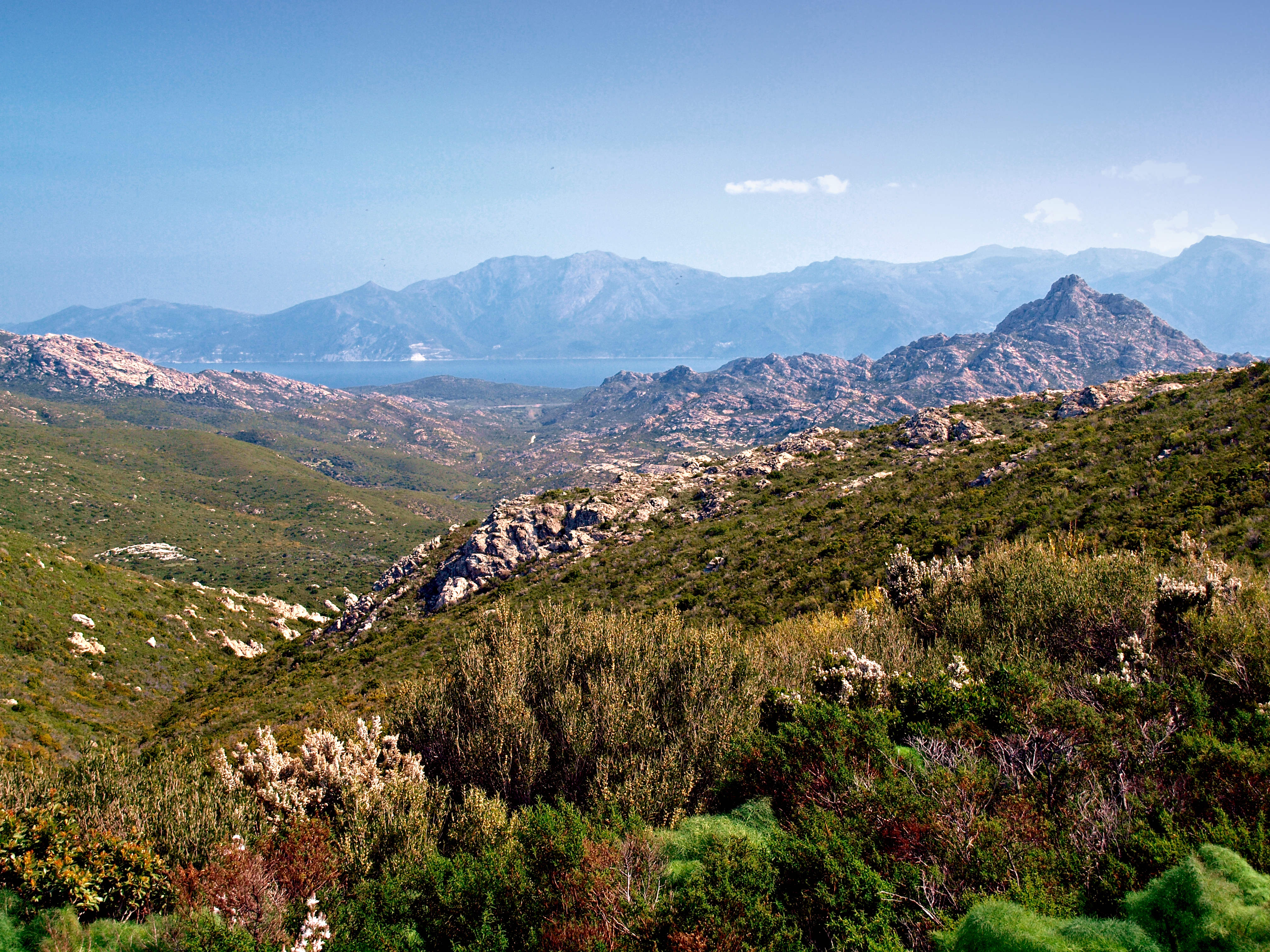 Santo-Pietro-di-Tenda (Corsica) - Désert des Agriates